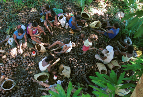 Quebradeiras de Côco da região do Bico do Papagaio. Município de Pequizeiro - Tocantins